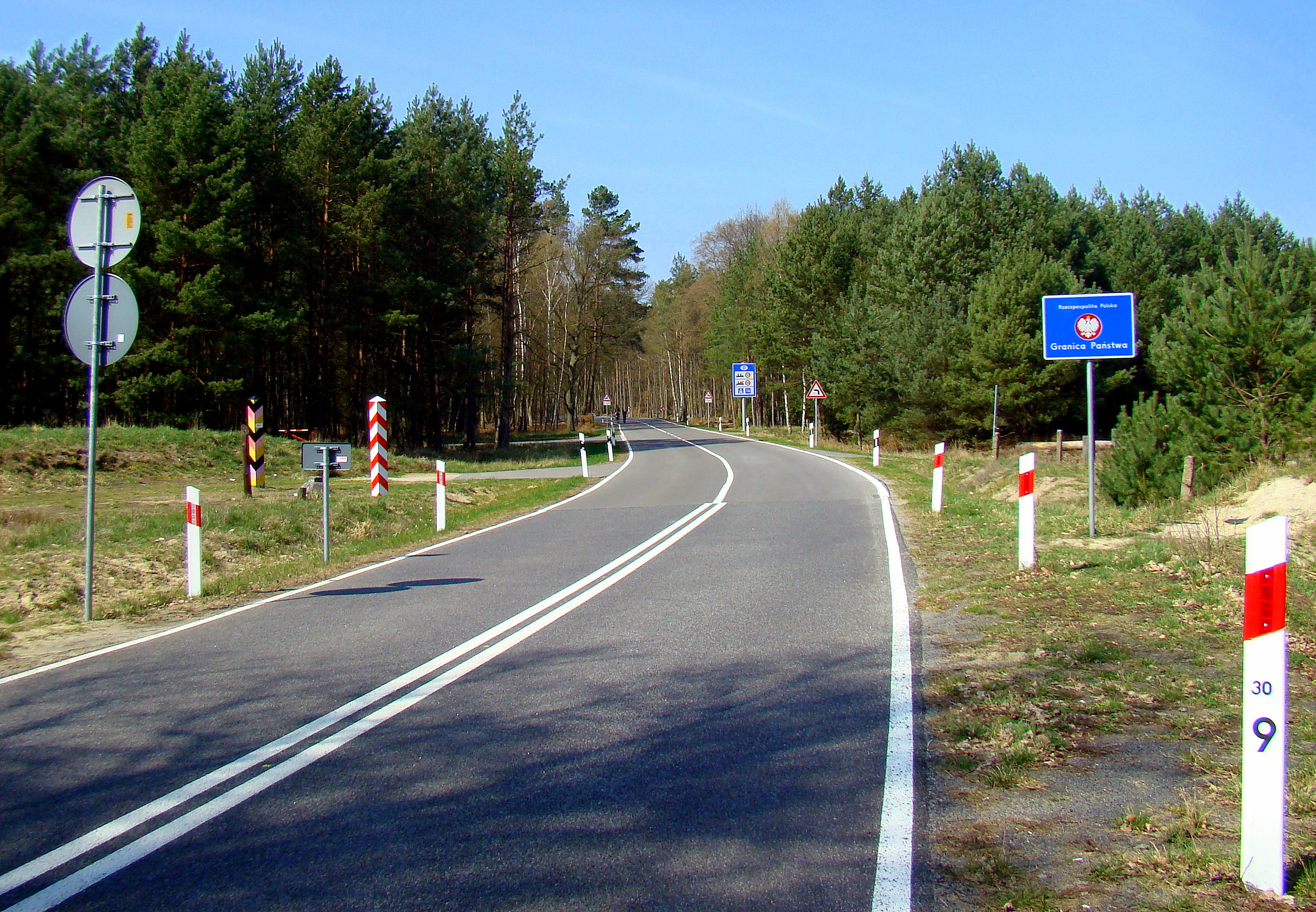 Státní hranice mezi Polskem a Německem - poblíž obce Dobiesczyn, pohled z polské strany do Německa